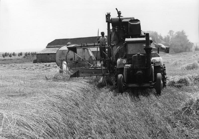 Gut Bolten in Enzen bei Zülpich 8.8.57, Mähdrescher Information added by Wikimedia users.Lanz Bulldog mit gezogenem Claas-Super-Mähdrescher